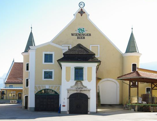 Poststr. 1, 83317 TeisendorfThis is a photograph of an architectural monument.